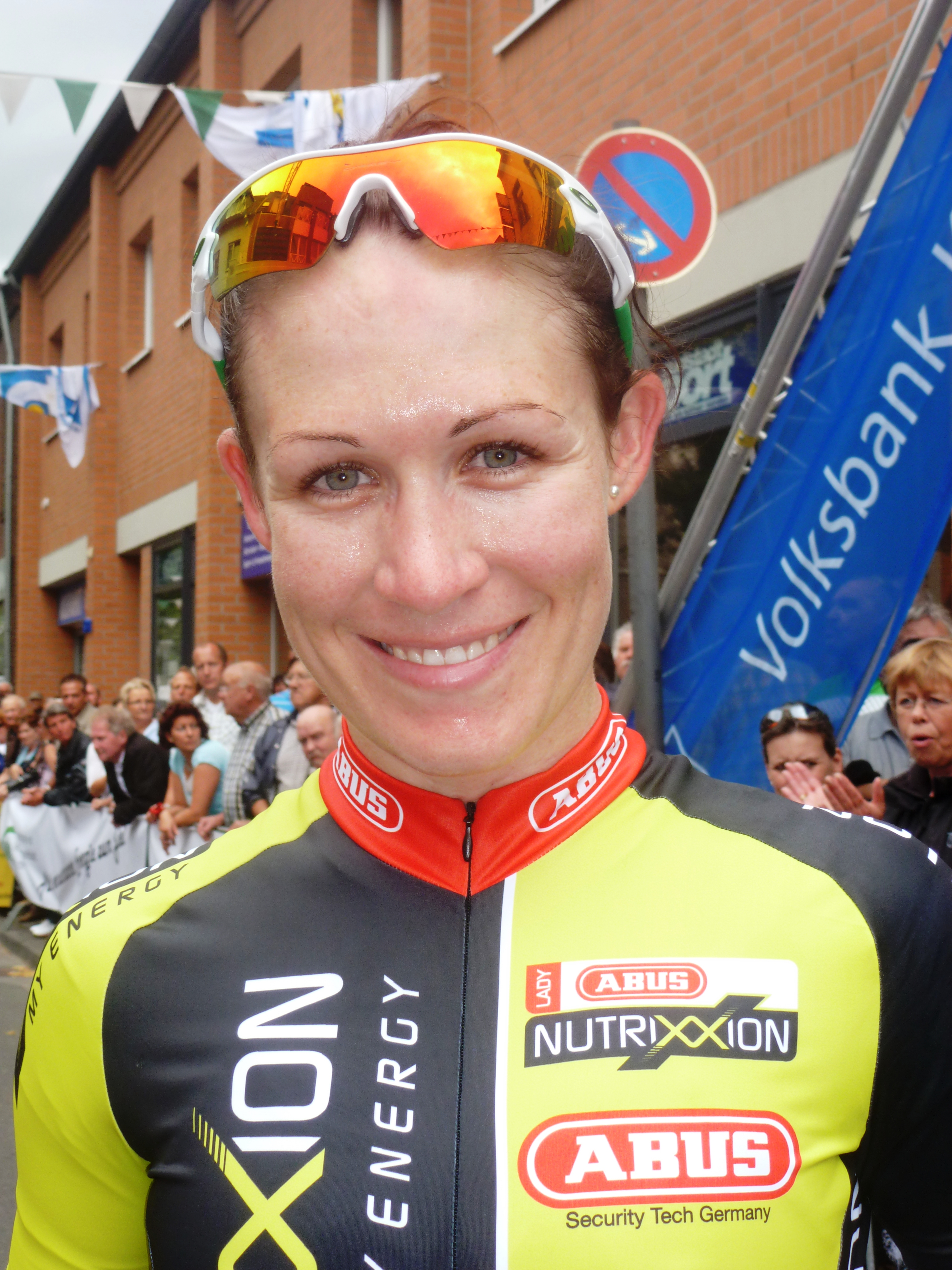 Katherine Bates, australische Radrennfahrerin